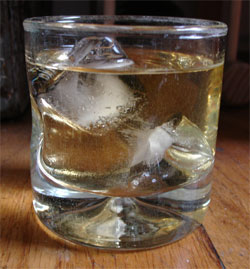 Mini: Que el próximo año esté lleno de dicha y amor. ¡Feliz 2009! Un fuerte abrazo, BetoCG – ¿decías? 23:05 31 dic 2008 (UTC).